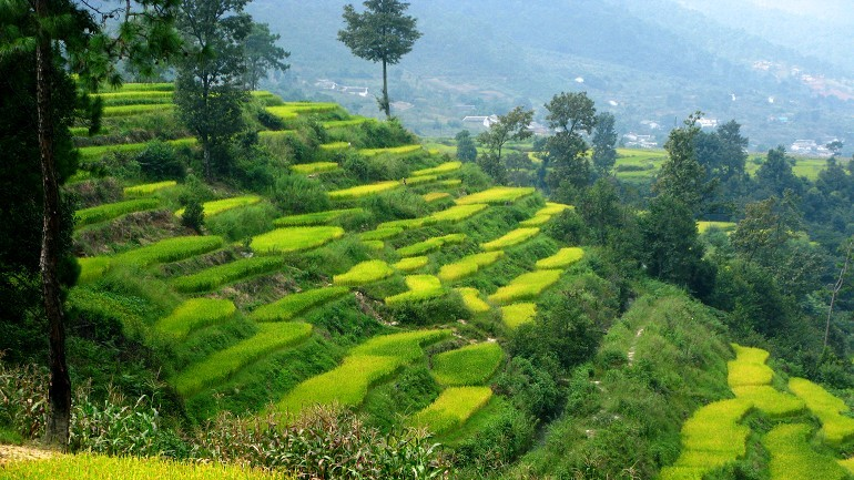 螺髻山仙人洞附近的梯田-流浪的狗狗